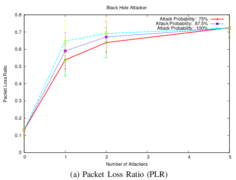 Ratio des paquets perdus sur une attaque de type trou noir sur un réseau utilisant le protocole de routage aodv